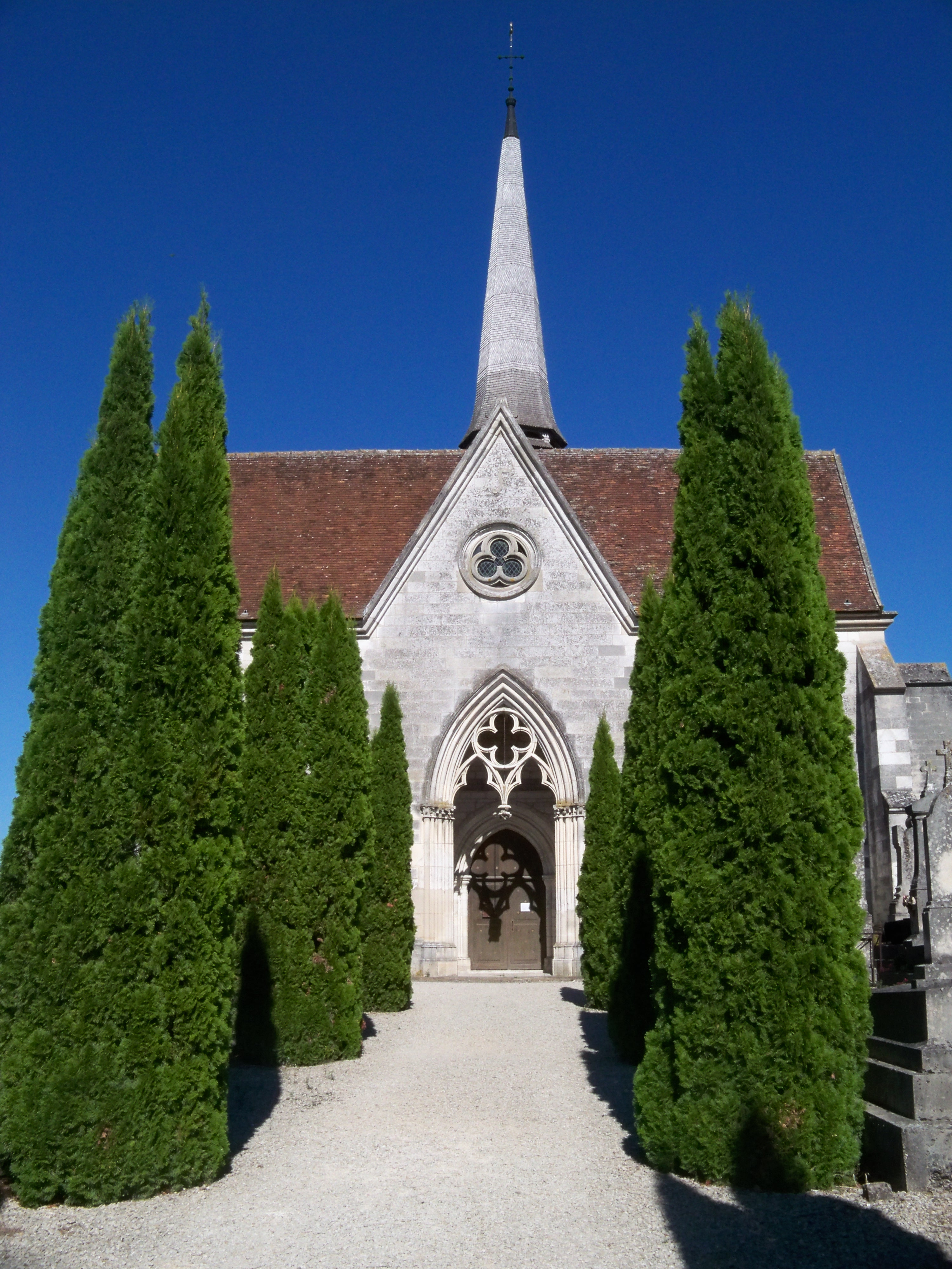 L'église Saint-Aventin de Creney-près-Troyes, monument de culte classé par arrêté du 6 mai 1907. .